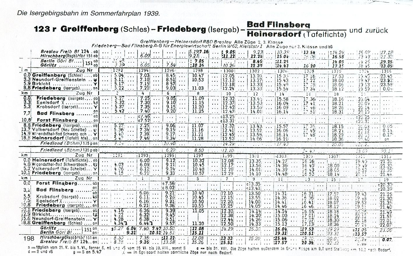 Fahrplan der Nebenbahn von Greifenberg aus dem Jahr 1939